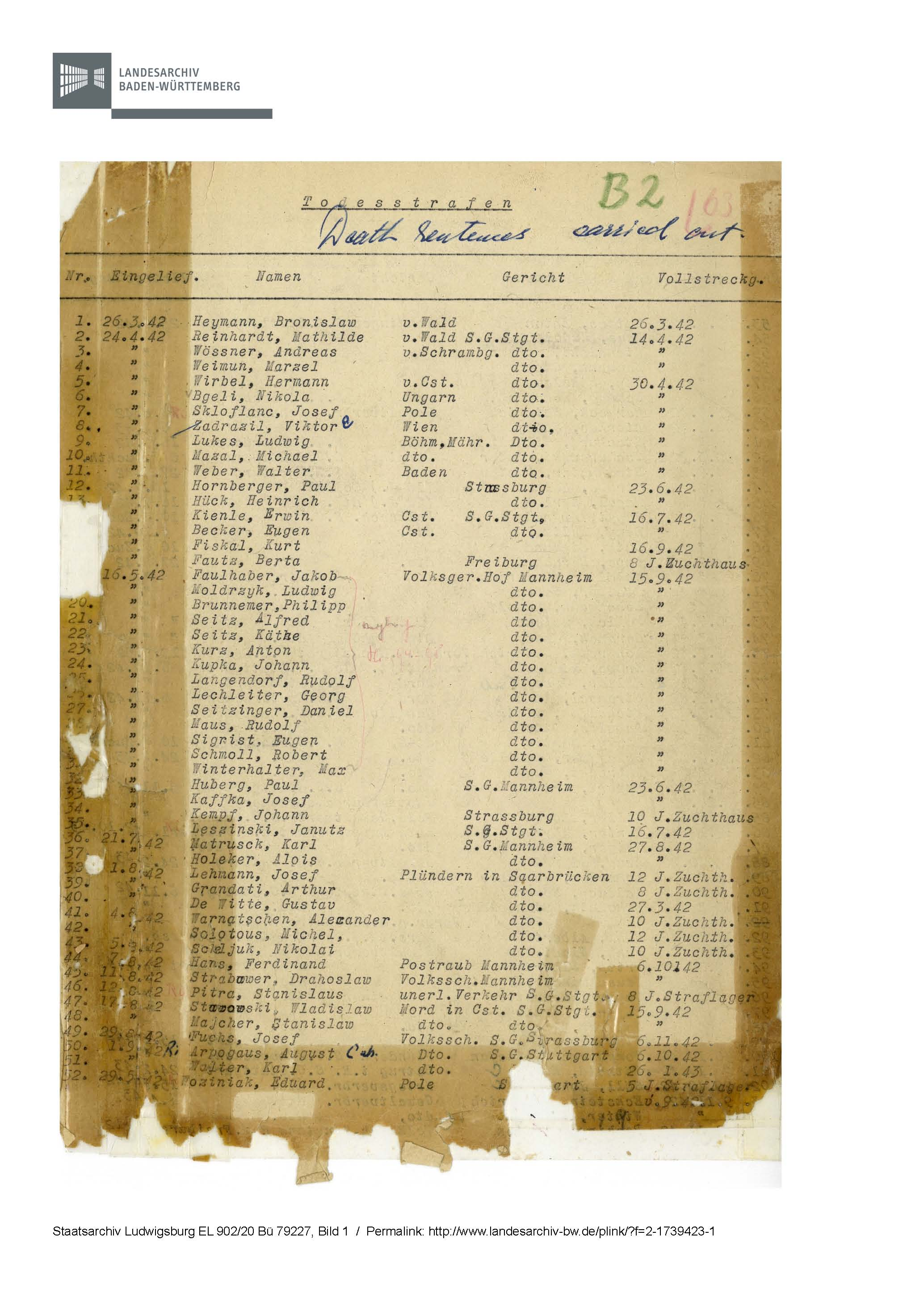 Liste „Todesstrafen“, die von 1942-1944 im Hof des Stuttgarter Landgerichts vollstreckt wurden, Seite 1.